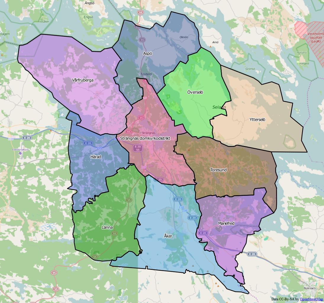 Distriktsindelningen i Strängnäs kommun World file: 82.73531695505930372 0 0 -82.73531695505930372 1853928.72343755629844964 8299177.95065639354288578